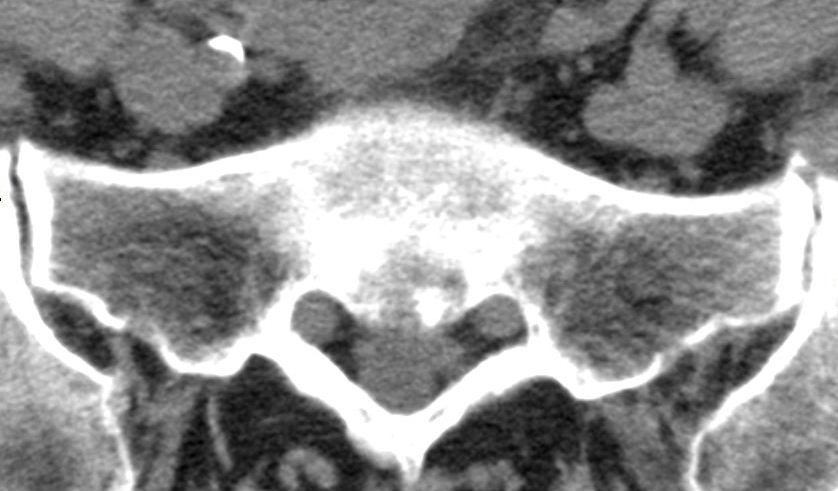 Bildbeschreibung: ISG-Arthrose Quelle: eigene Aufnahme Autor: User:Scuba-limp